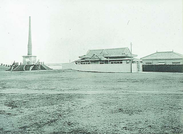 西元1908年（明治41年）4月30日凌晨，剛結束遠洋航海回到澎湖馬公港的松島艦，因藥火自然燃燒而爆炸下沉，350名船員近半數喪生。此為以松島艦主砲砲身與螺旋推進器所建造的慰靈碑，位於馬公公園內。